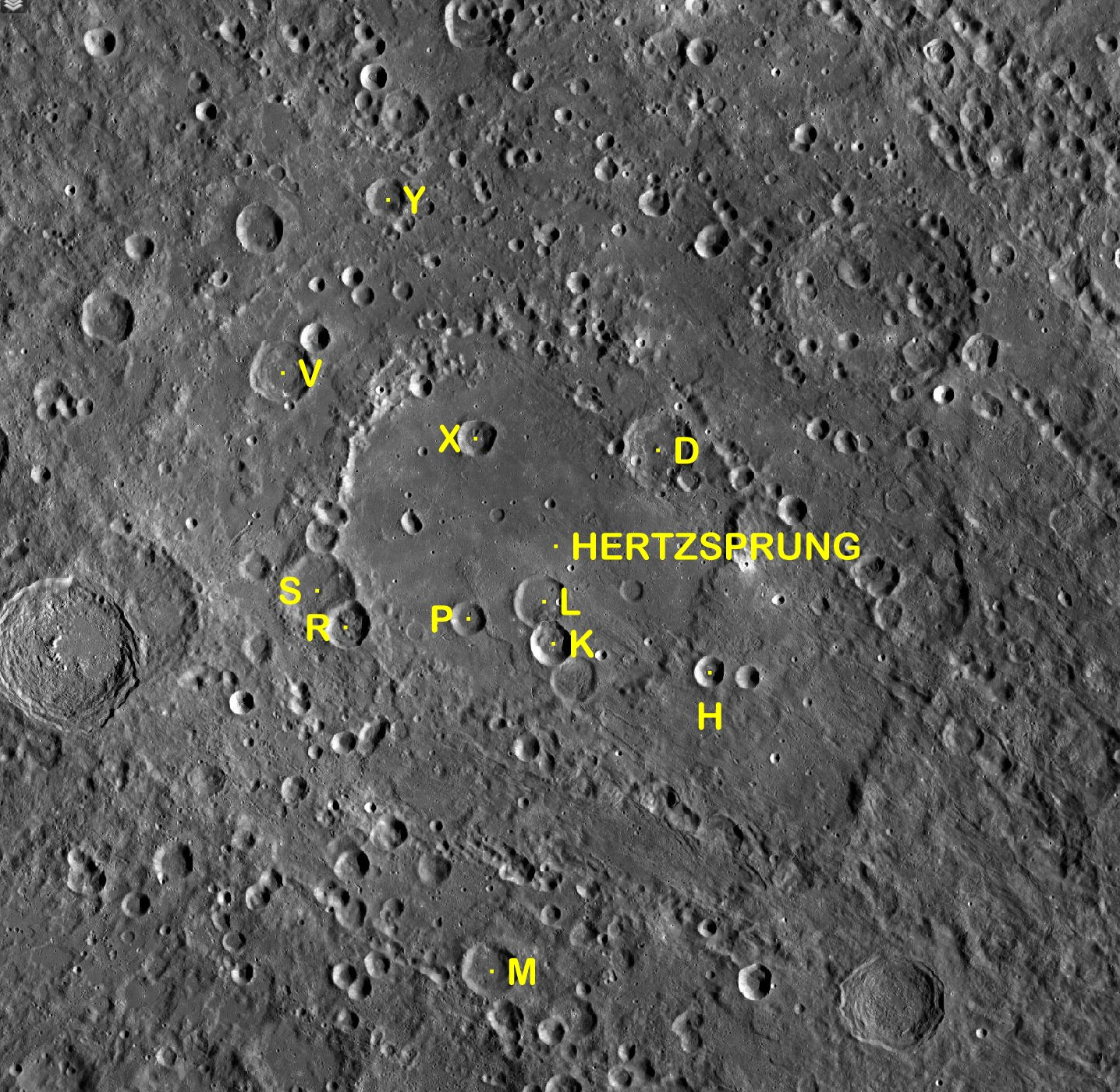 Cráter lunar Hertzsprung. Cráteres satélite. (Imagen LROC)